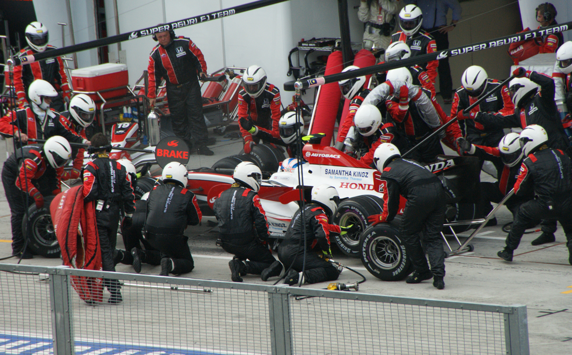 Super Aguri pit stop Sepang 2008